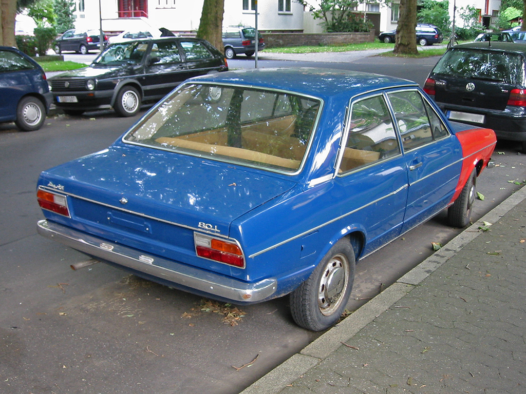 Audi 80 (B1)